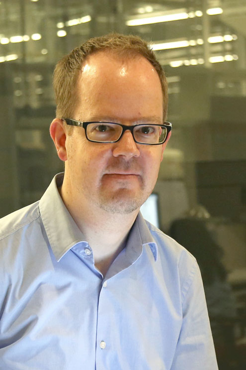 Huisken, Jan 2018